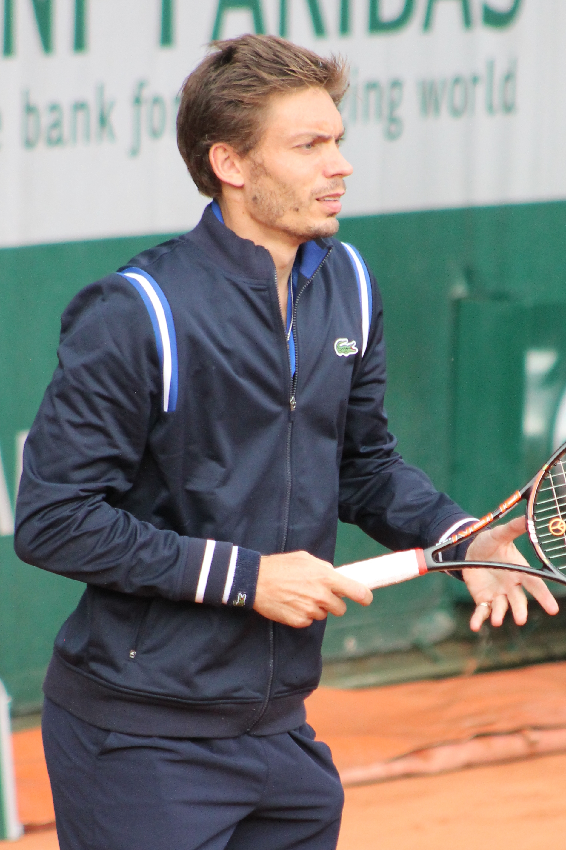 Mahut RG16 (2)